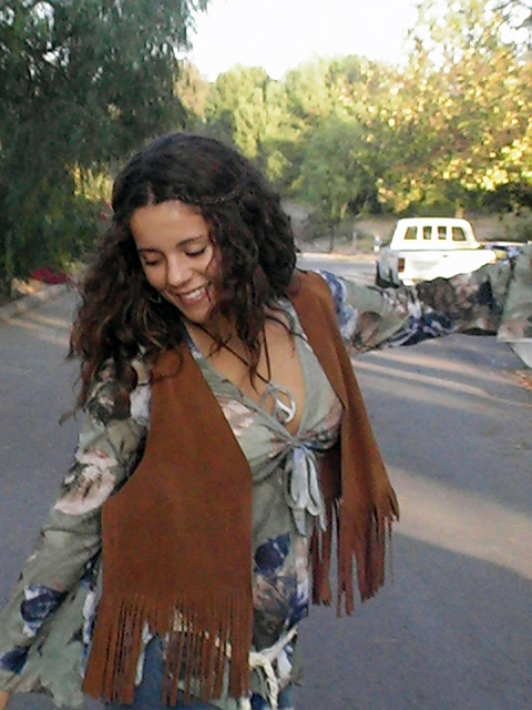 hippie